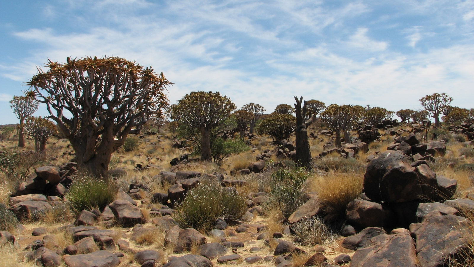 Köcherbaumwald, Namibia